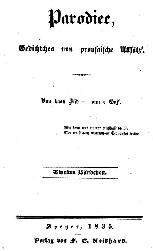 Christian Heinrich Gilardone, Titelblatt lotegorisches Buch, 1835